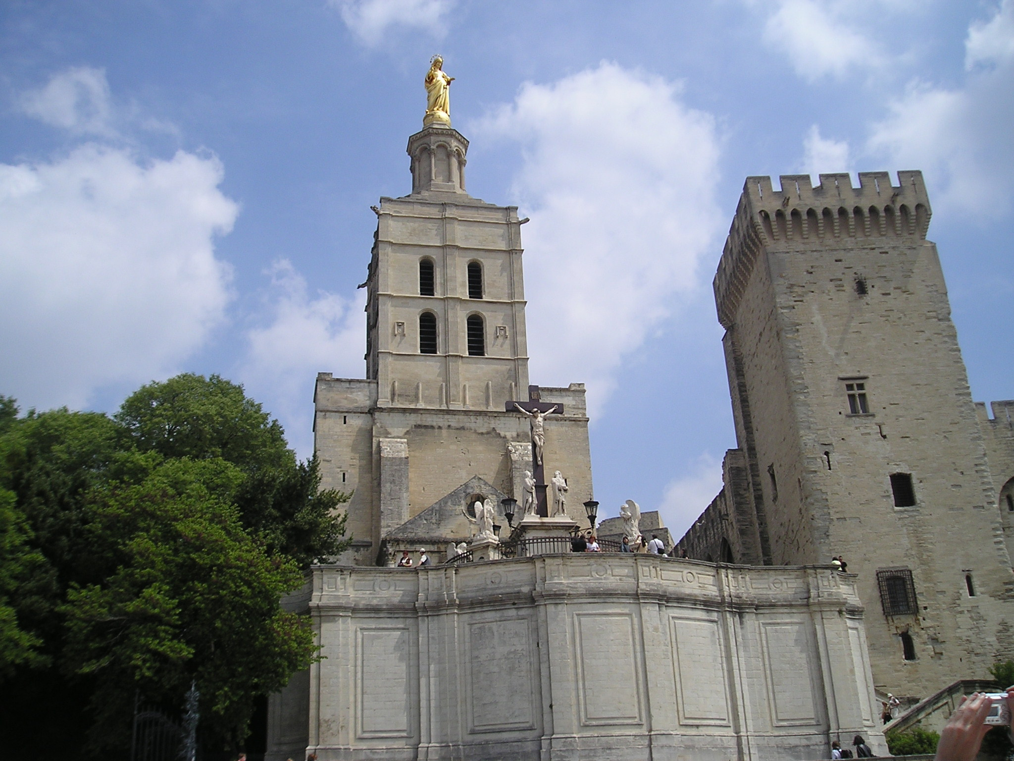 Palazzo dei Papiad Avignone (autore Massimo Macconi)